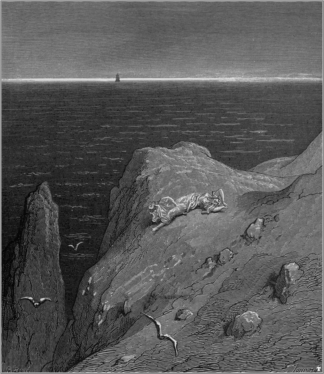 illustration of Ludovico Ariosto’s “Orlando Furioso”.